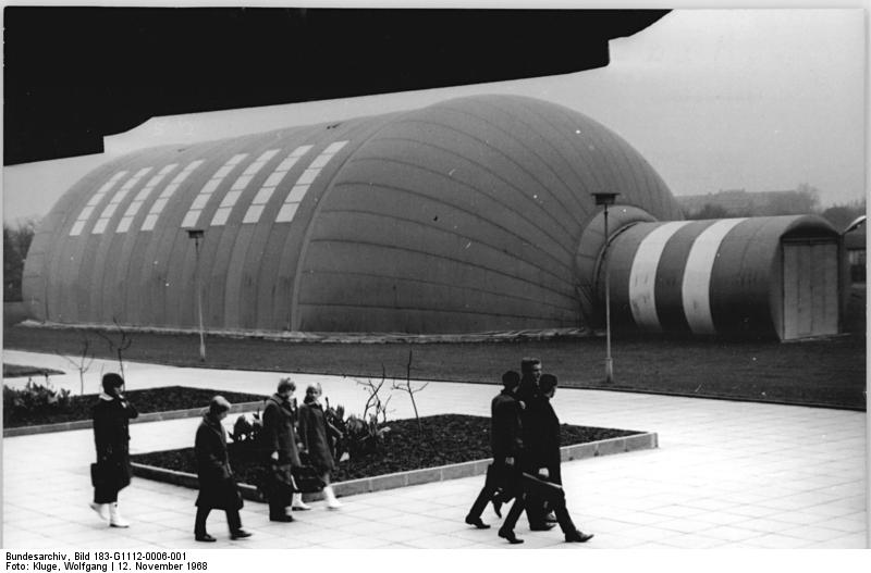 Leipzig, DHfK, Traglufthalle Zentralbild Kluge Ma. 12..11.1968-Leipzig: Traglufthalle als Sportstätte. Diese Traglufthalle an der DHfK in Leipzig wird bald in eine Sportstätte "verwandelt" werden. Entsprechende Vorbereitungen mit dem Ziel, dieses auf dem Gelände der Sporthochschule errichtete "Riesenzelt" erstmals in der DDR für Sportspiele wie Basketball und Volleyball sowie für verschiedene Leichtathletische Disziplinen nutzen zu können, sind im Gange. Die Halle hat eine Fläche von 800 Quadratmetern und eine Höhe von zehn Metern. Vier Masten mit je sechs Mischleuchten garantieren gute Lichtverhältnisse, während eine Warmluftheizung im Winter für angenehme Termperaturen sorgen wird.